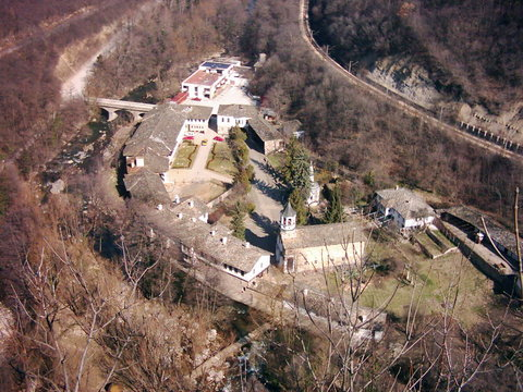 Dryanovo Monastery, Bulgaria